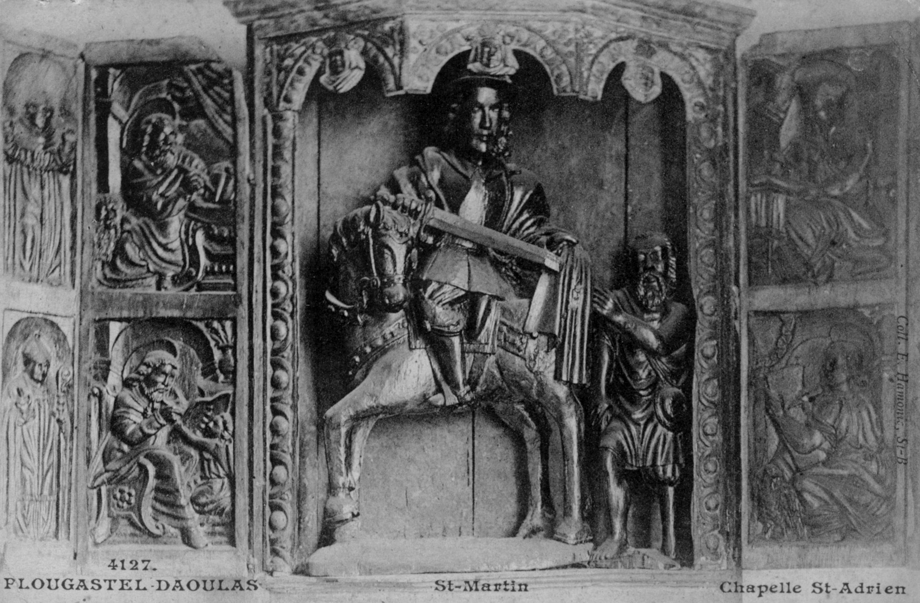 Plougastel-Daoulas. Chapelle Saint-Adrien. Saint-Martin. (Coll. E. Hamonic, St.-B.)